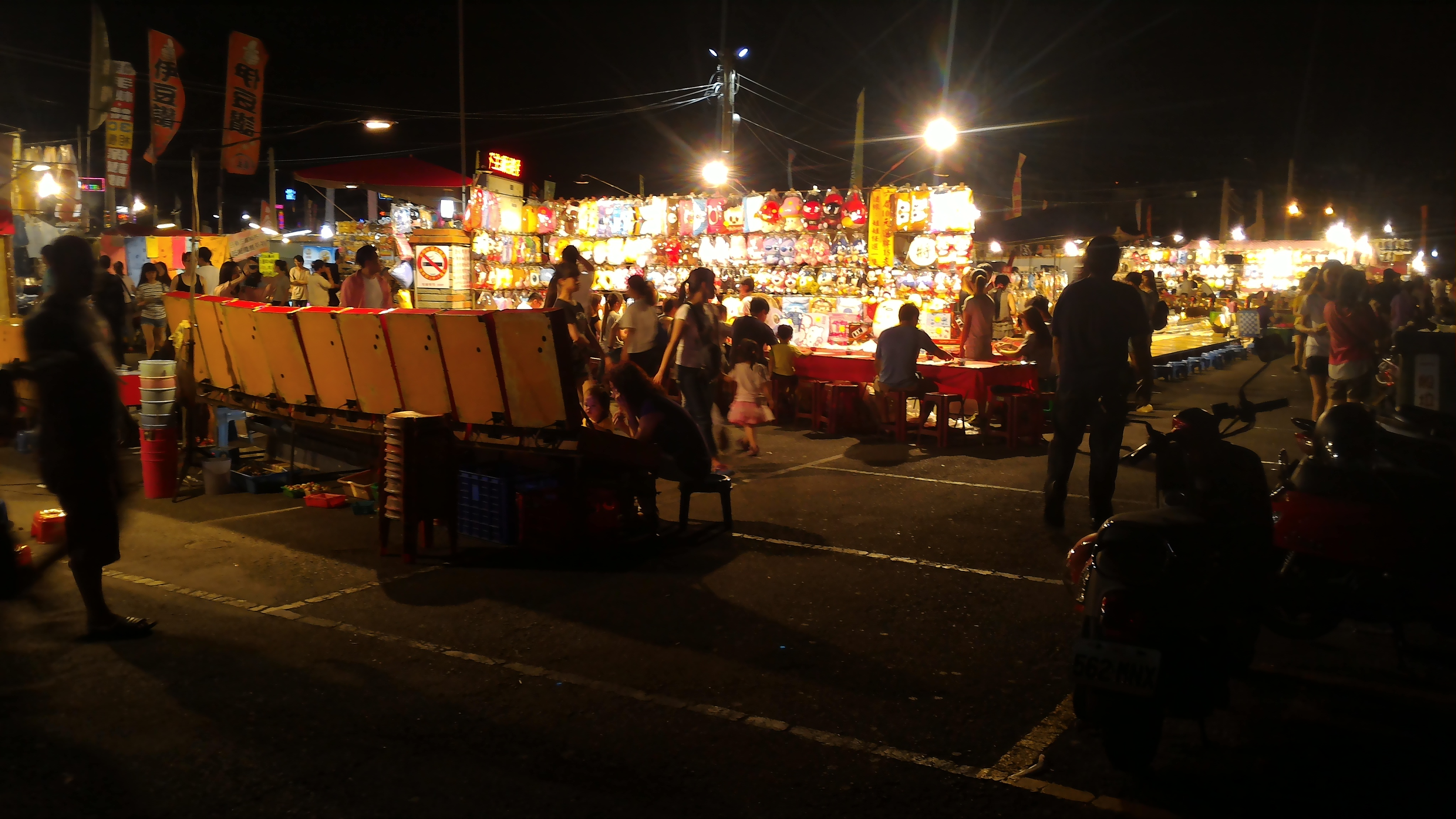 台南花園夜市 景觀